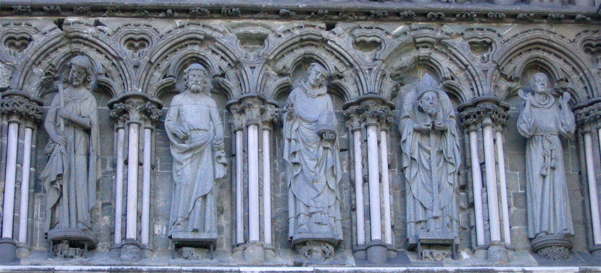 Nidarosdomen in Trondheim, Norwegen